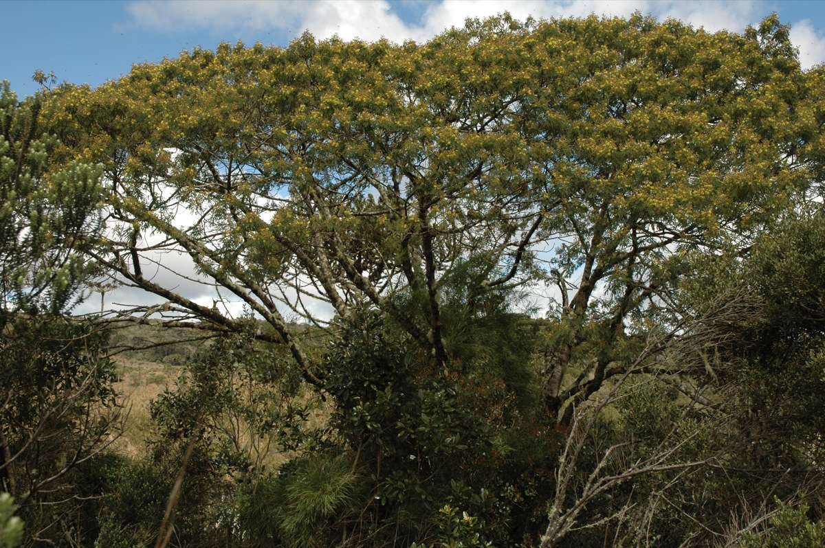 Parque Nacional dos Aparados da Serra. Cambará do Sul, RS. Mimosa scabrella.